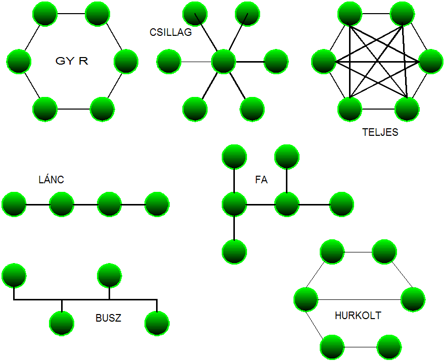 Hálózati topológiatípusok